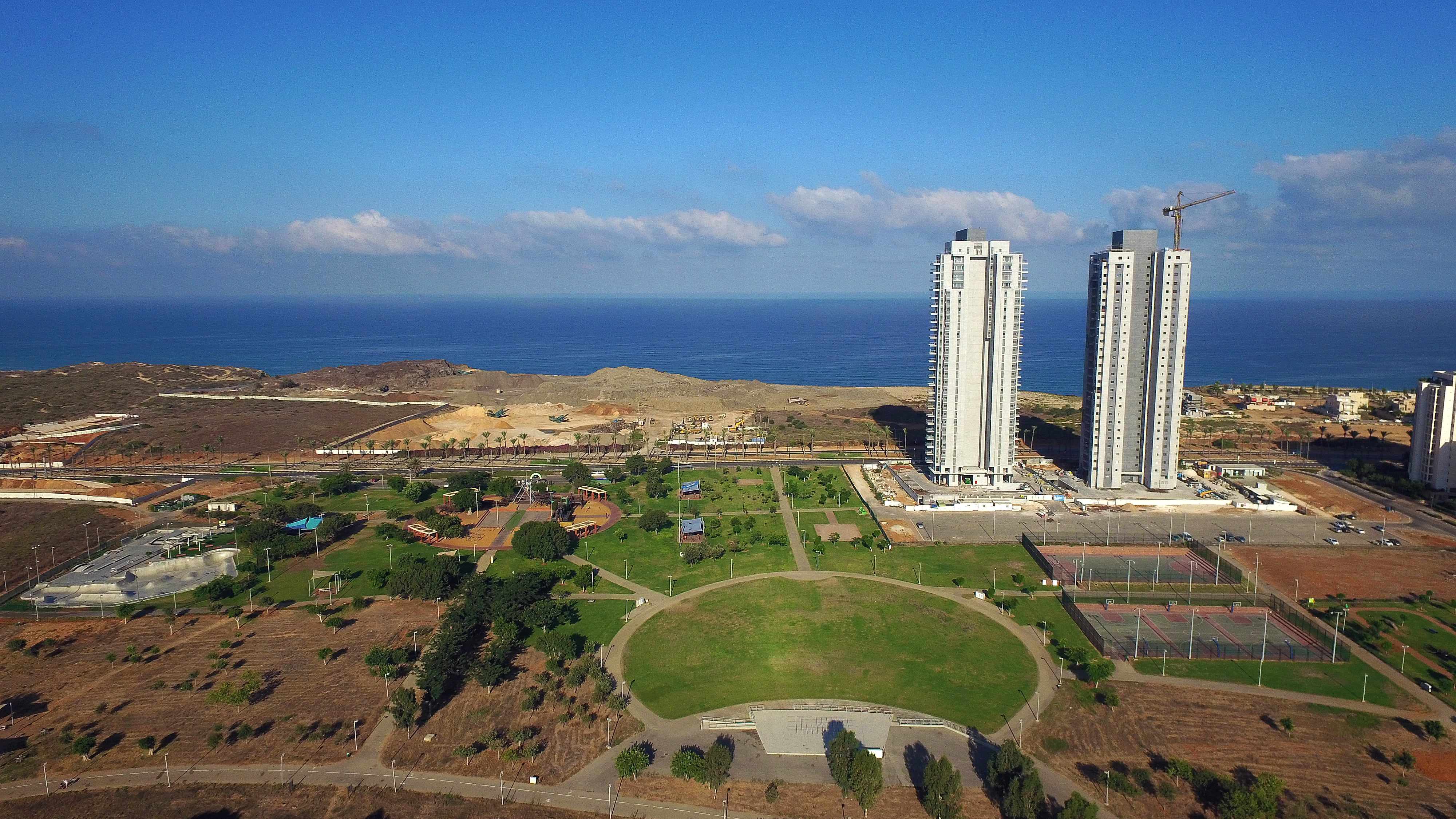 פארק שלולית החורף